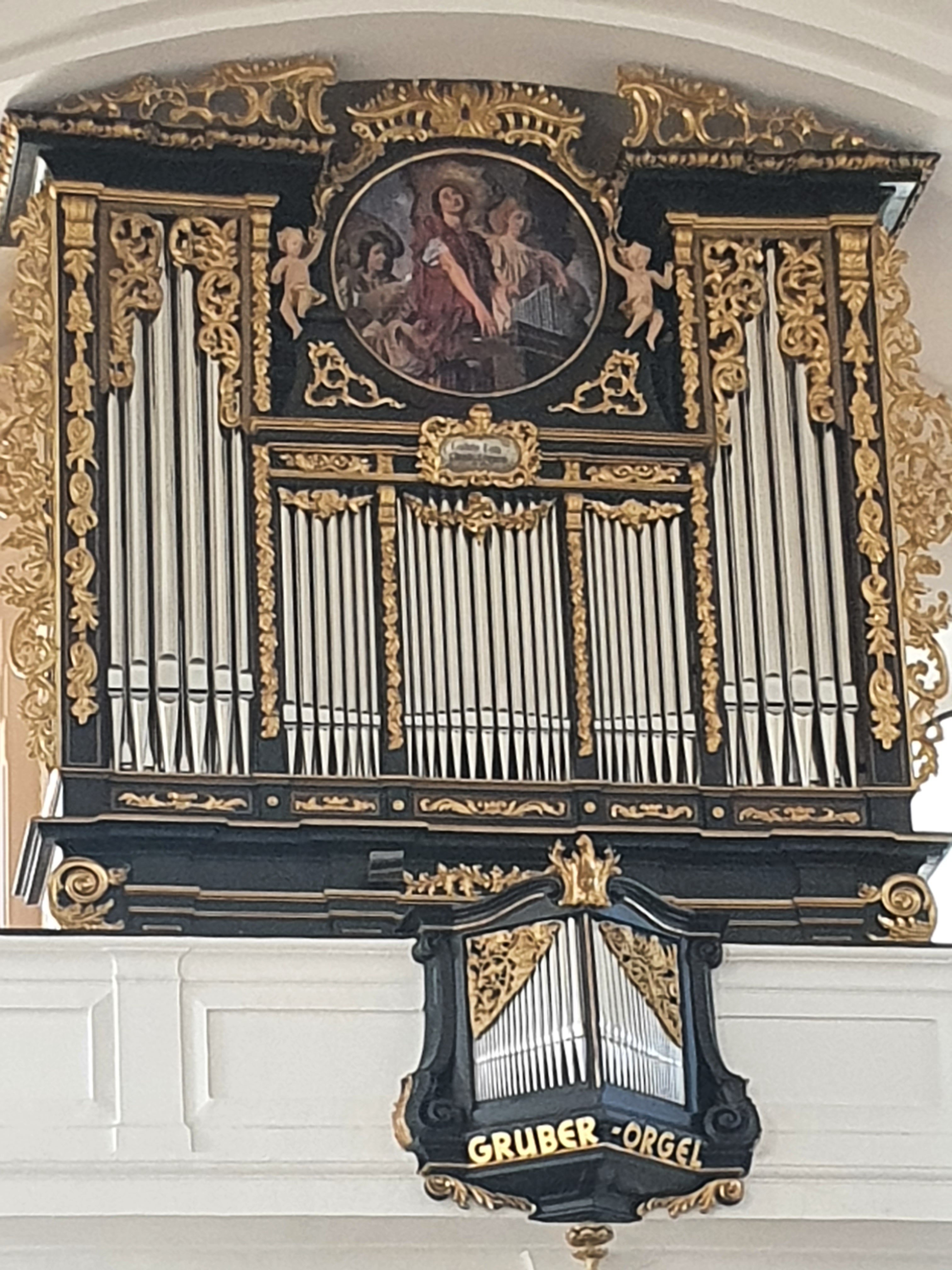 Gehäuse von Christoph Egedacher 1704, Rieger Orgelbau 2018